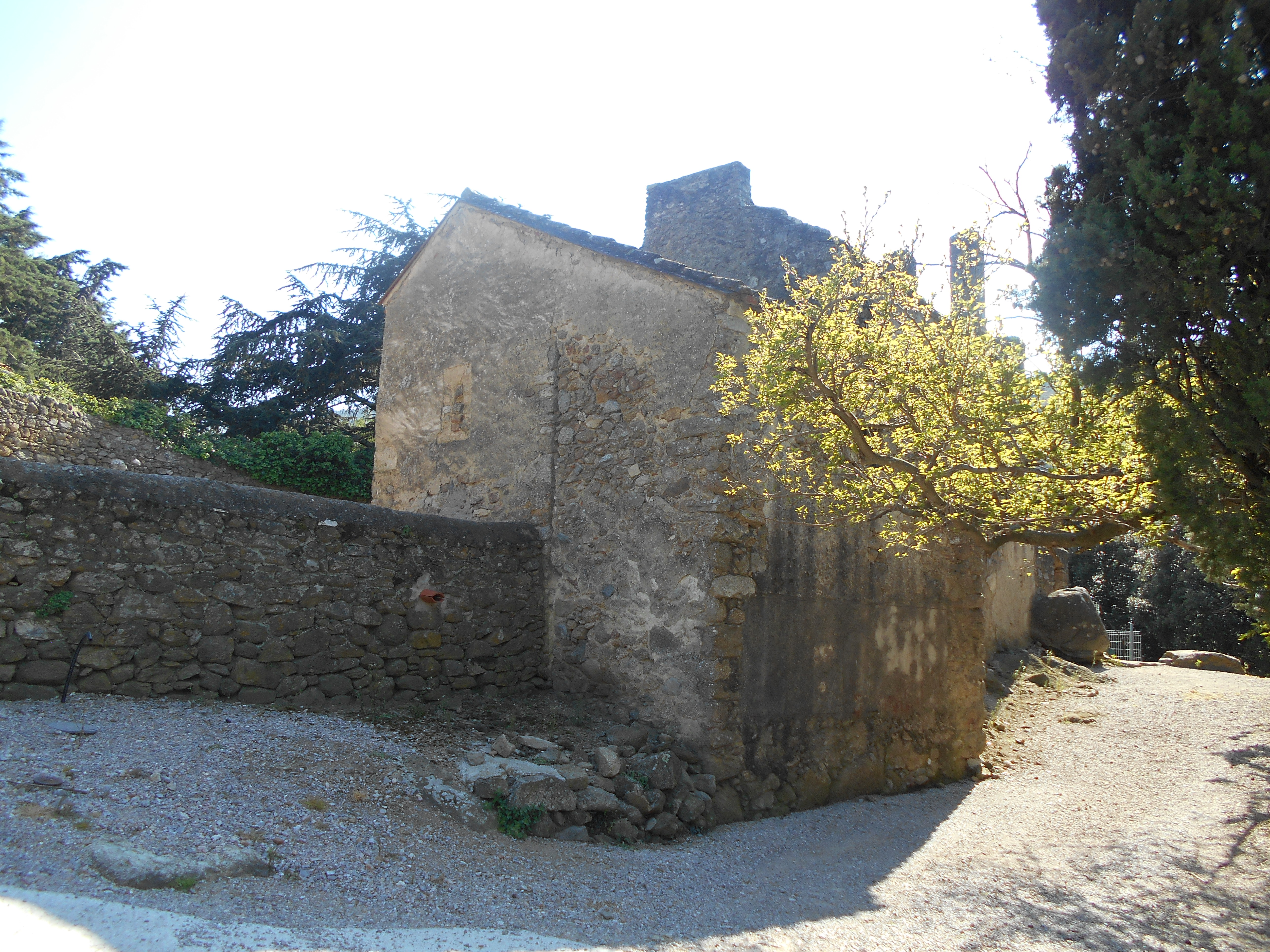 Sant Martí de Riunoguers